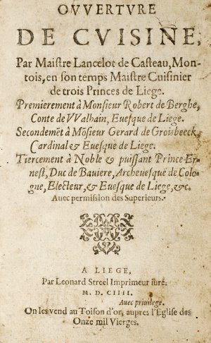 Couverture du livre de Lancelot de Casteau : Ouverture de cuisine